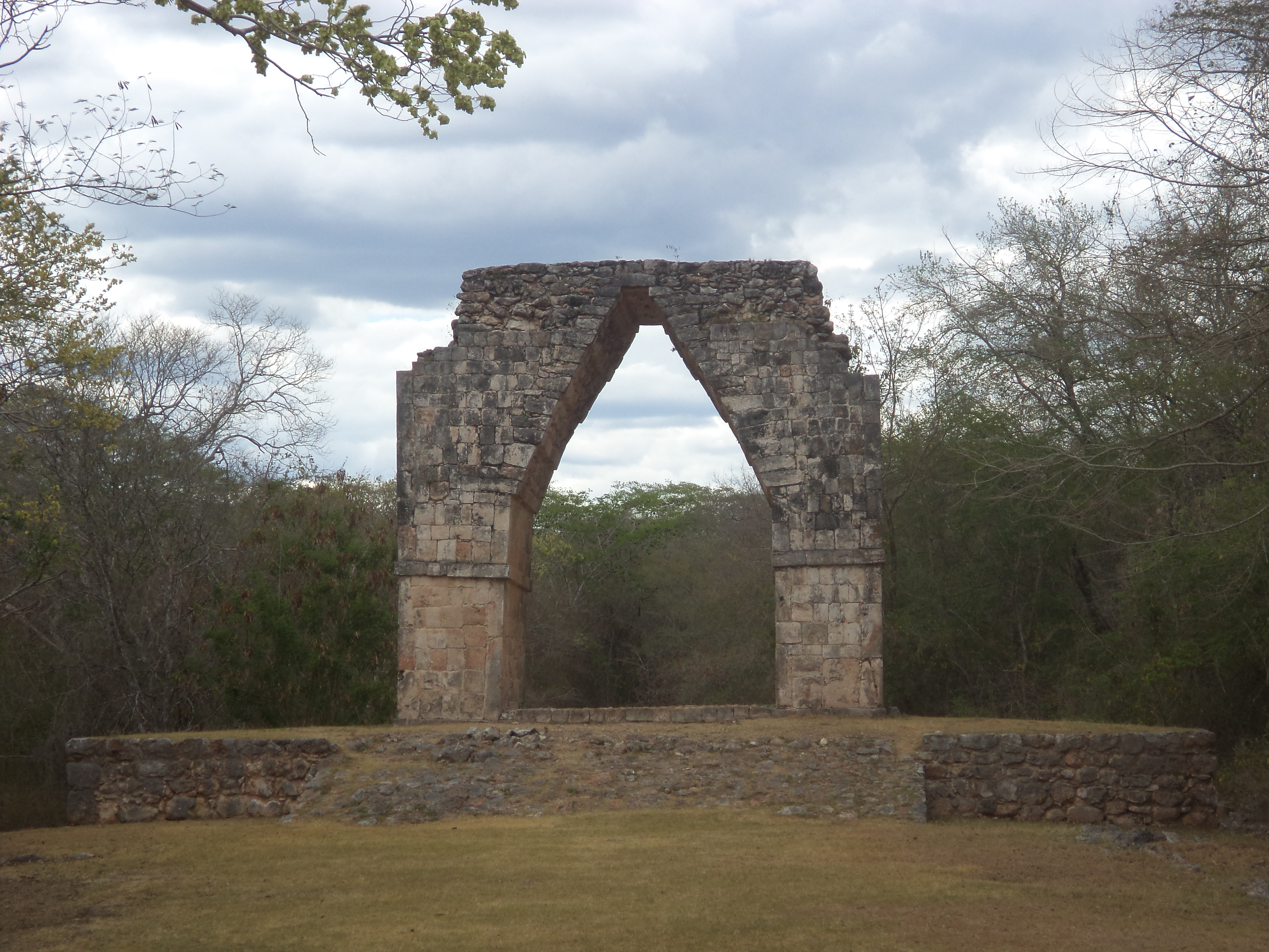 Kabah